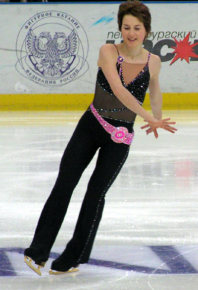 Irina Sluzkaja während der Russischen Meisterschaften 2005